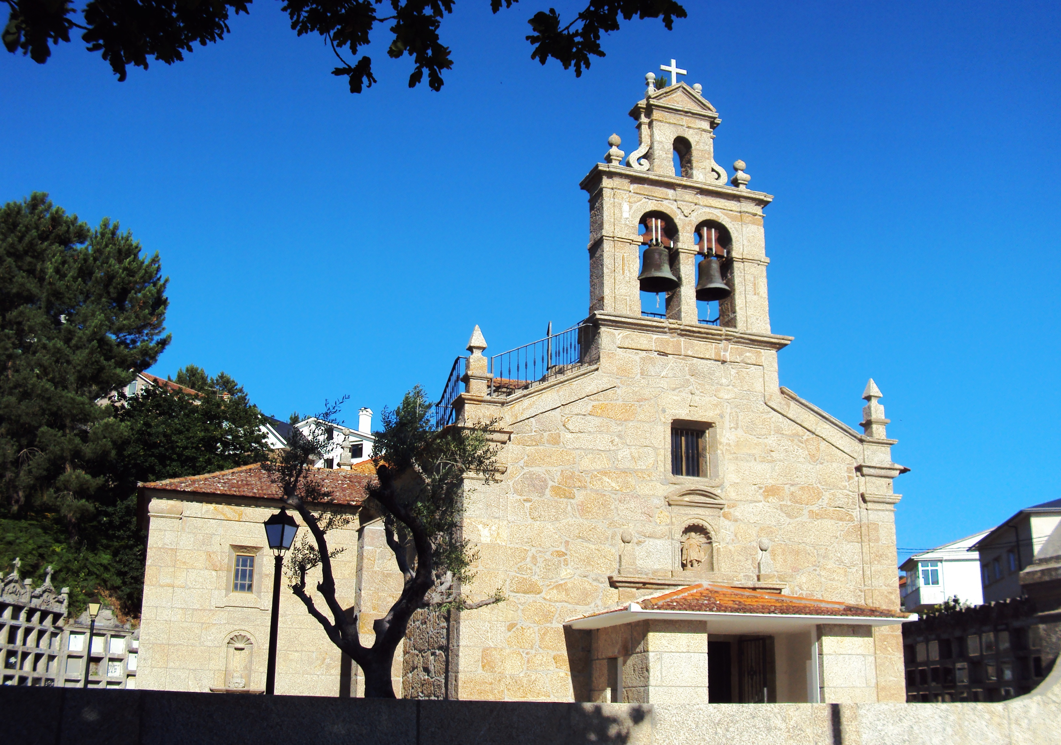 Igrexa parroquial de San Mamede de Priegue, Nigrán.